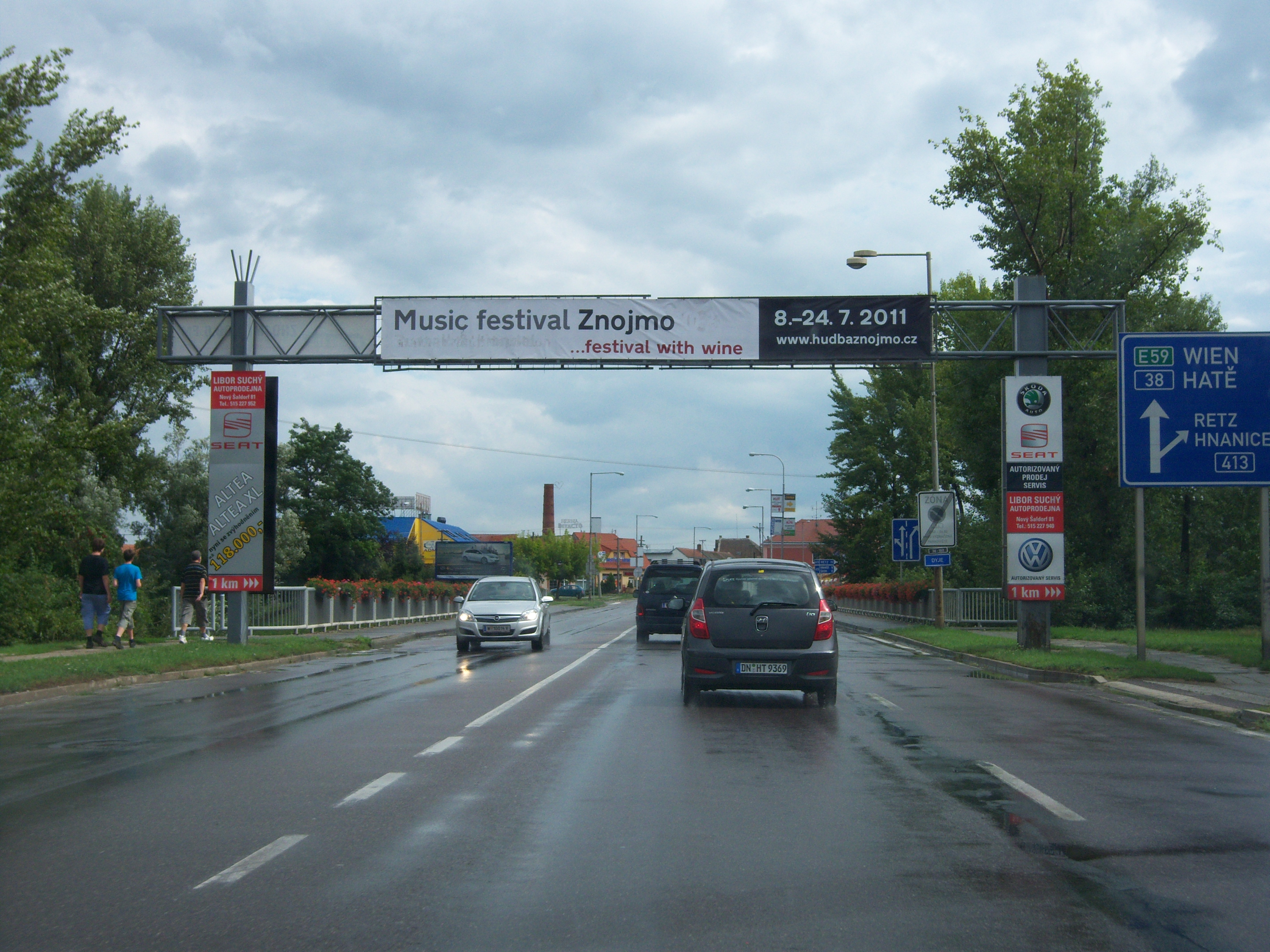 Silnice I/38 Jihlava–Znojmo: Zmojmo